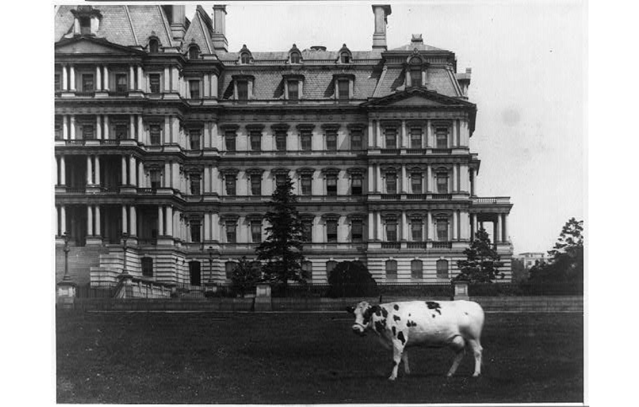 William Howard Tafts Kuh Pauline vor dem State, War and Navy Building, Washington, D.C.